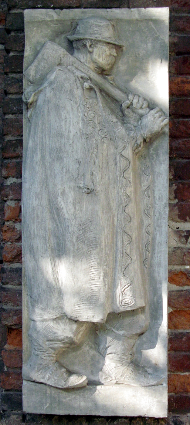 "Drvosječa", rad Roberta Frangeša Mihanovića iz 1910. godine, Zagreb, Hrvatska